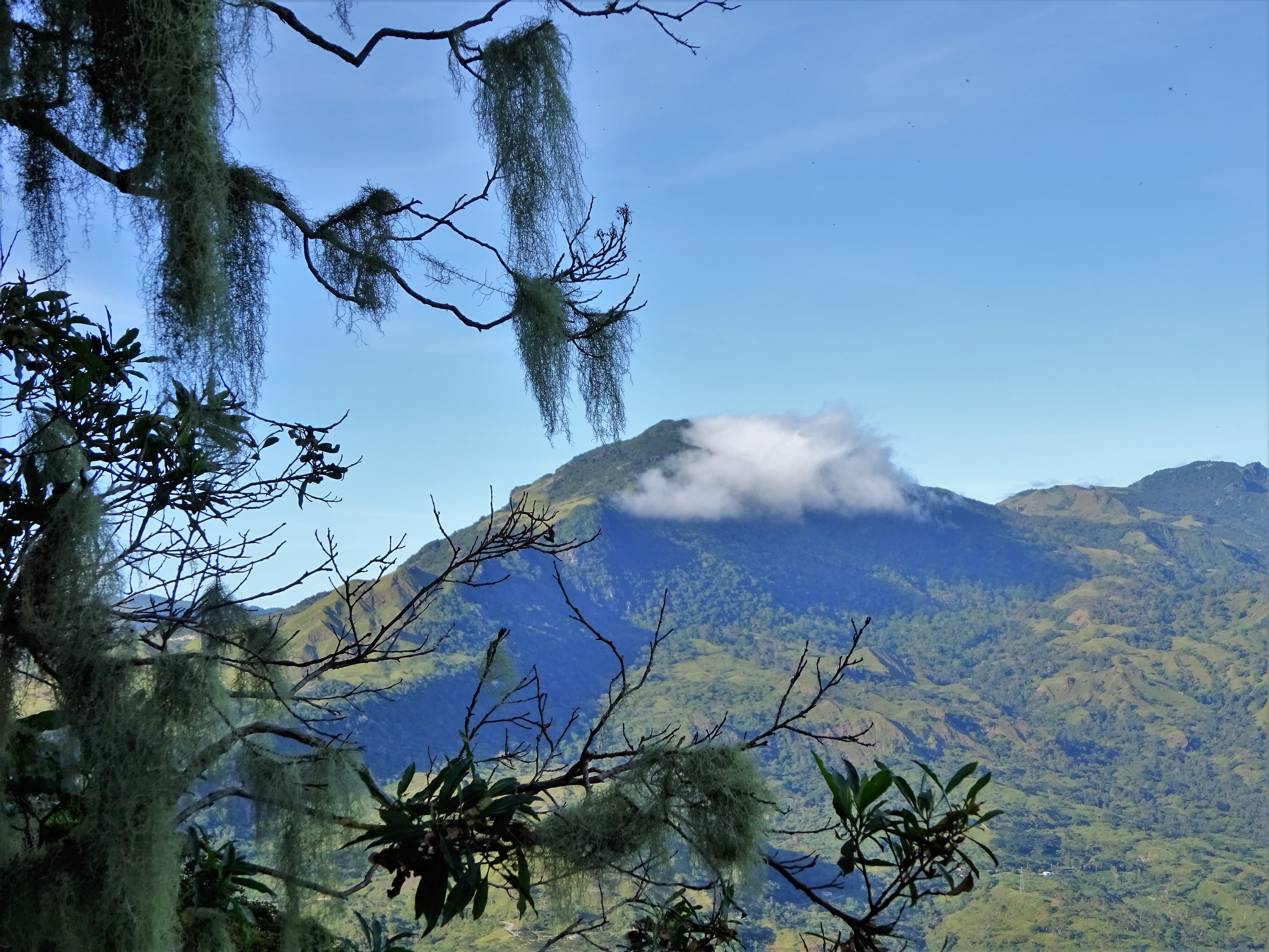 Der Berg Leolaco